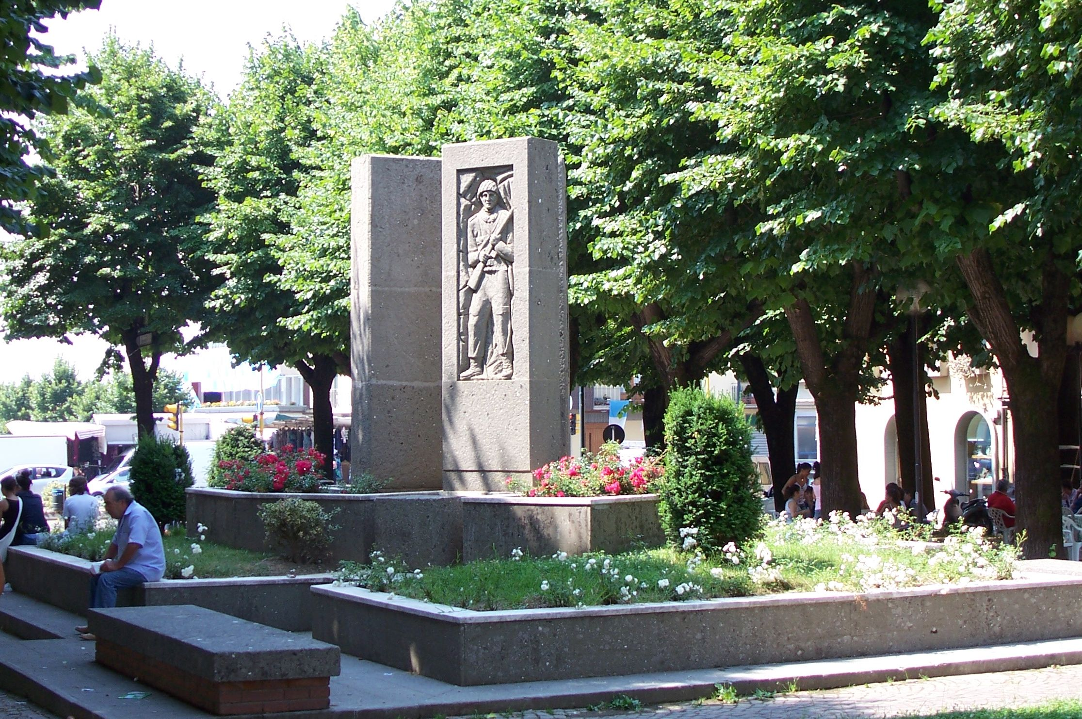 Montale, monumento ai caduti, piazza Matteotti